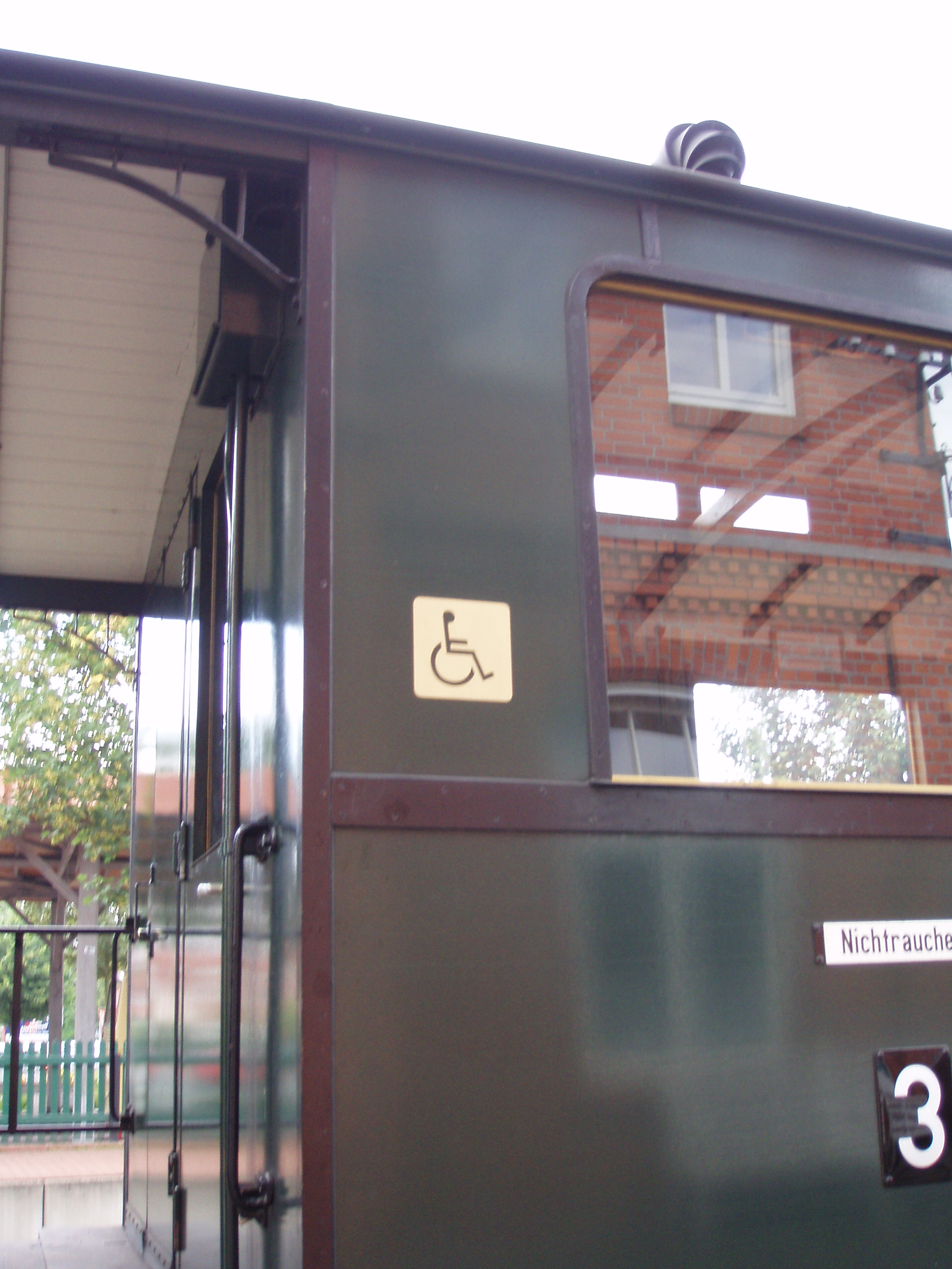 DEV 17 Detail, Bruchhausen-Vilsen DEV 17 wurde 1913 oder 1914 von der Waggonfabrik Wismar gebaut und war zunächst wohl bei der Kolberger Kleinbahn im Einsatz, die 1940 in den Pommerschen Landesbahnen aufging. Die Wagennummern beider Phasen sind nicht sicher überliefert. Infolge des Krieges ging der Wagen in den Besitz der Polnischen Staatsbahn über, wurde umgebaut und 1977 von einer Privatperson in Belgien gekauft. 1984 ging er in den Besitz der Selfkantbahn und dann in den der Märkischen Museumseisenbahn über. 1997 wurde er vom DEV übernommen und erneut umgebaut. Der Wagenkasten wurde ähnlich dem ursprünglichen Aussehen konstruiert, der Wagen aber für die Benutzung durch Rollstuhlfahrer ausgestattet. Die Hälfte der Sitze und Tische ist klappbar, die Fenster sind per Handkurbel zu bedienen, auf jeder Wagenseite befindet sich ein elektrohydraulischer Hublift. Seit 1998 ist der Wagen in seiner neuen Ausstattung beim DEV im Einsatz.